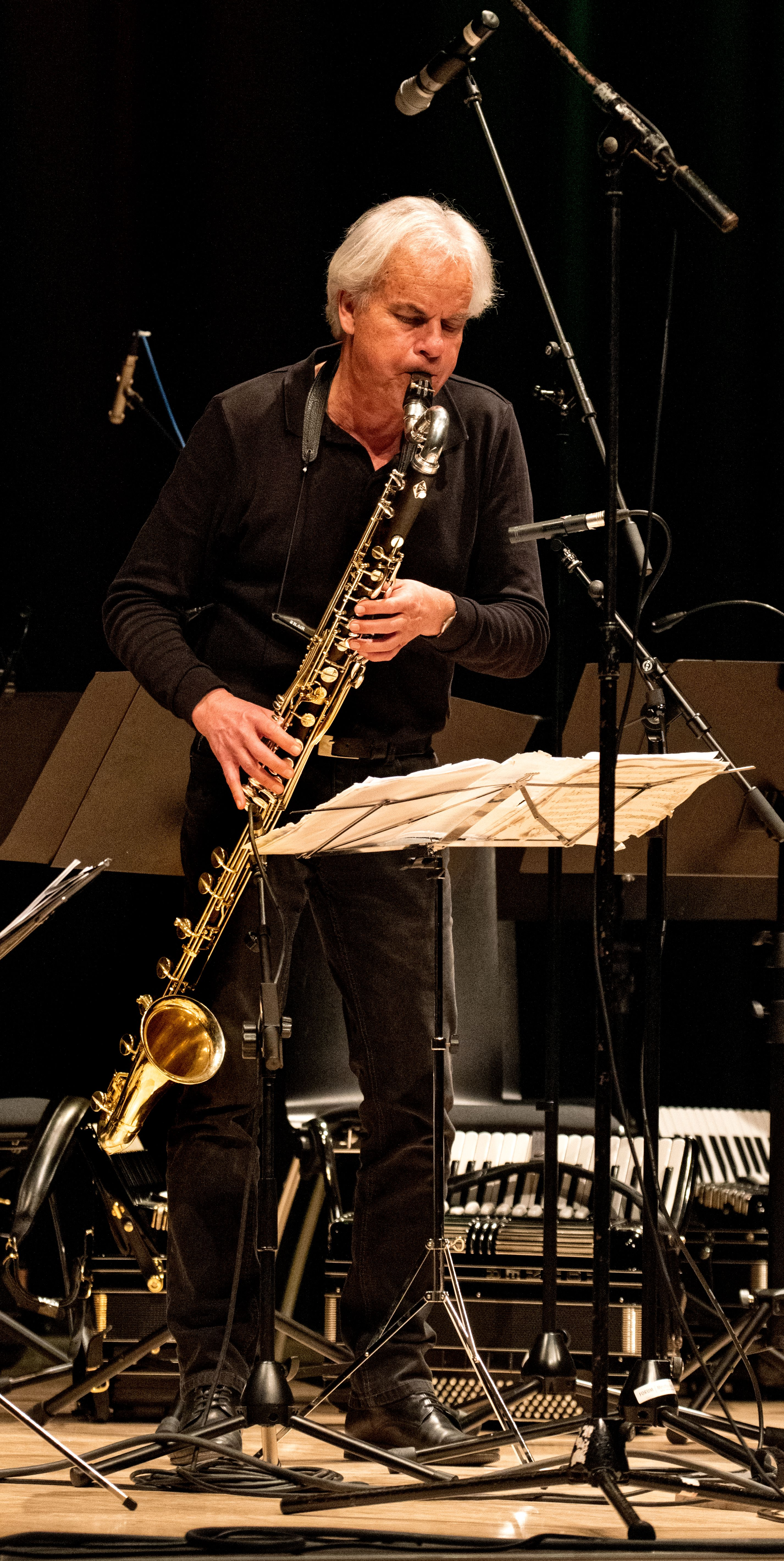 "Jeux Doubles" des Freiburger Akkordeon Orchesters im Forum Merzhausen am 15. 12. 2018 mit den Solisten Jean Lous Matinier Akkordeon und Michael Riessler Bassklarinette